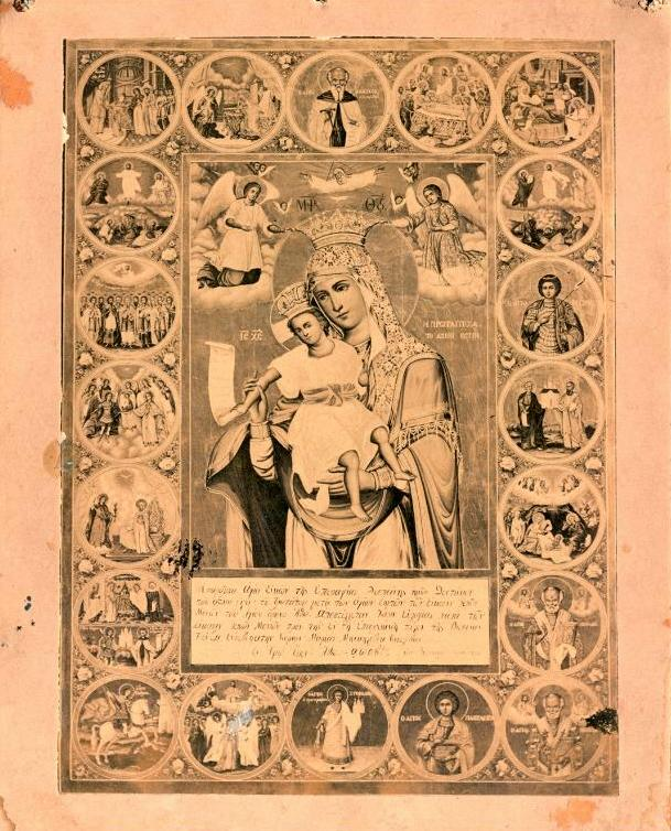 Άξιον εστί. Η θαυματουργή εικόνα του Πρωτάτου - Έργο και φωτογραφία Βενιαμίν ιερομονάχου Κοντράκη (1872)